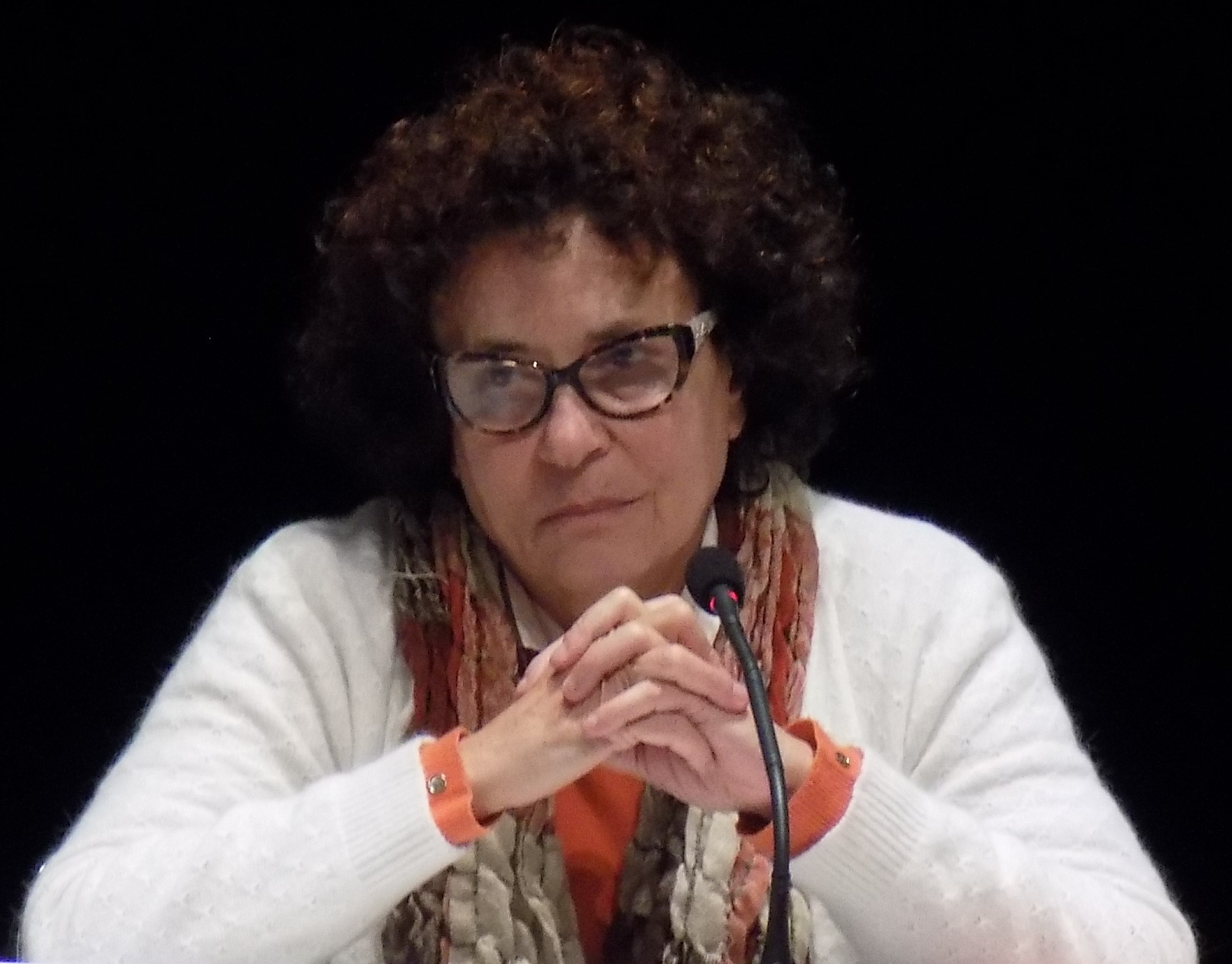 Marie-Angèle Hermitte lors de la 25e édition de la semaine de la science à Saint-Michel-sur-Orge